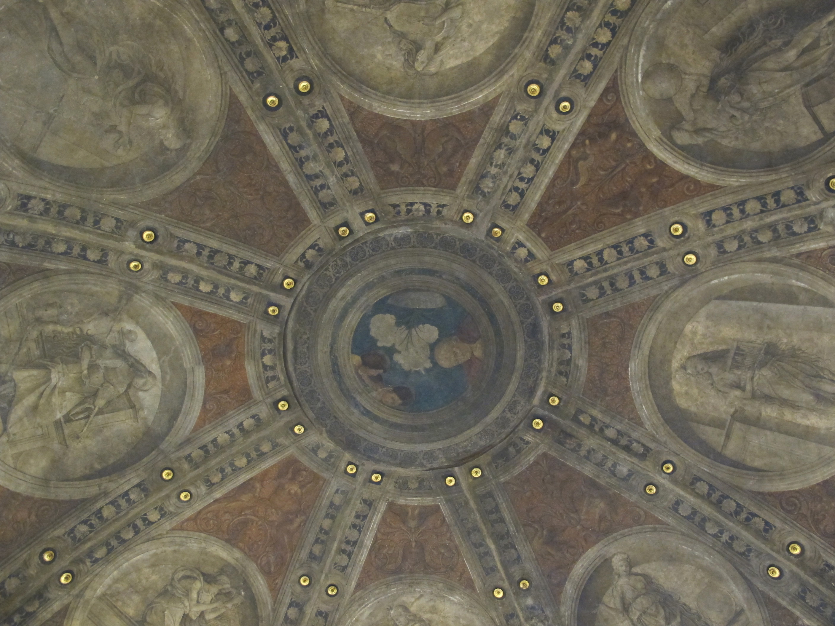 Alessandro pampurino, soffitto da casa ,affi, cremona, 1500 ca.